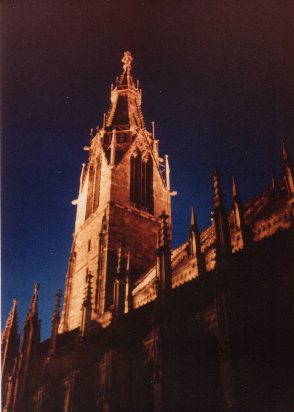 The Gothic Marienkirche in Reutlingen, Germany